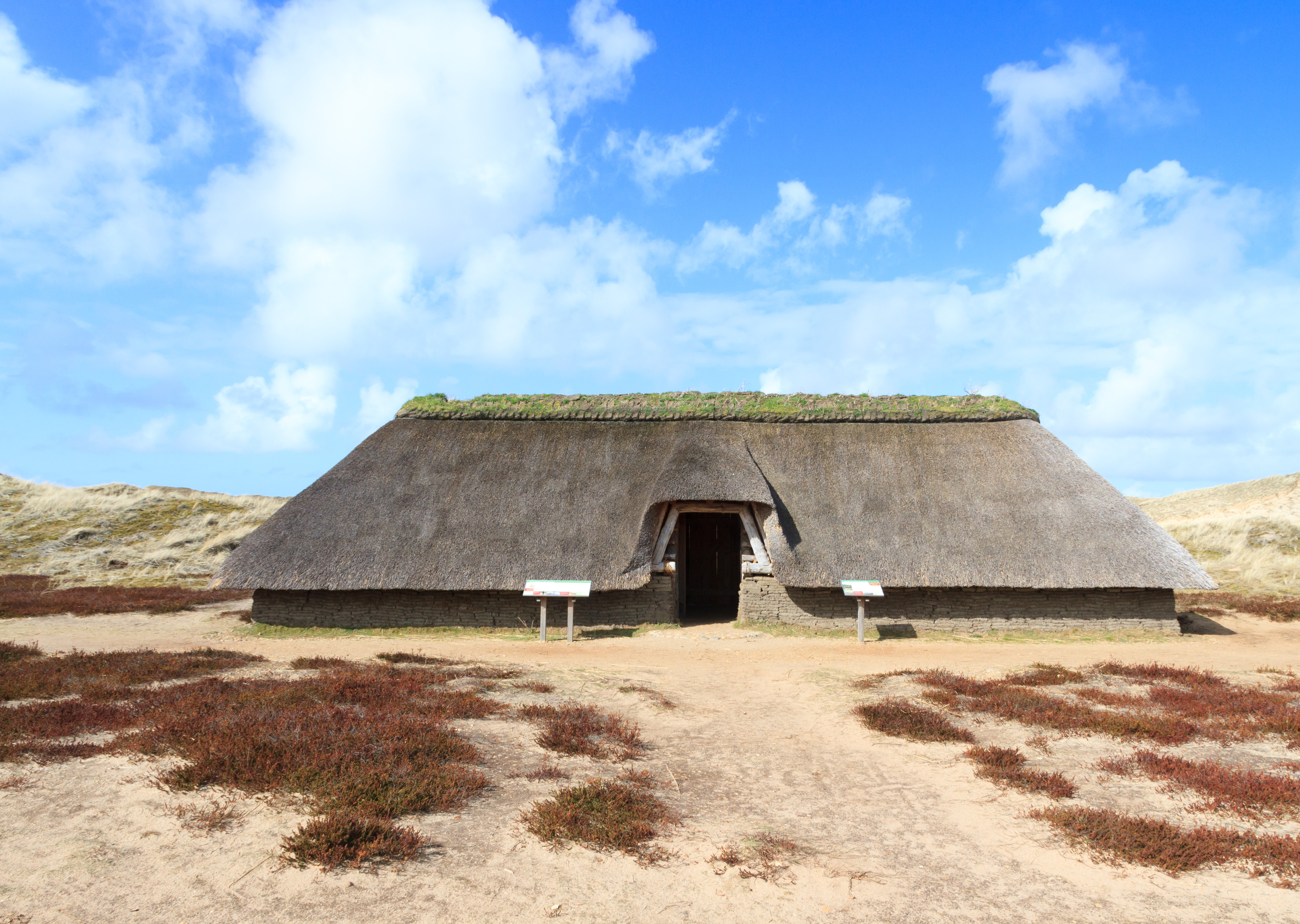 Nebel (Amrum) - Nachbau eines eisenzeitlichen Hauses